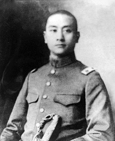 王文華（1887年－1921年）